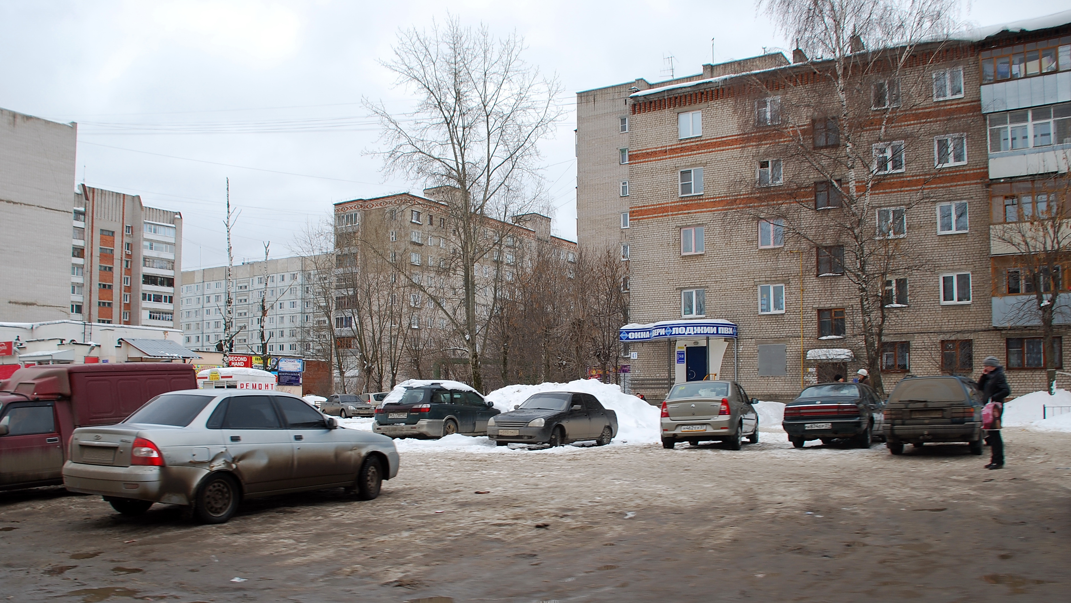 ул. Велижская